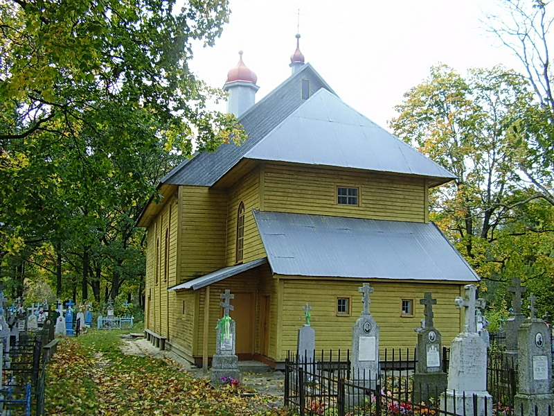 Яромічы. Свята-Міхайлаўская царква